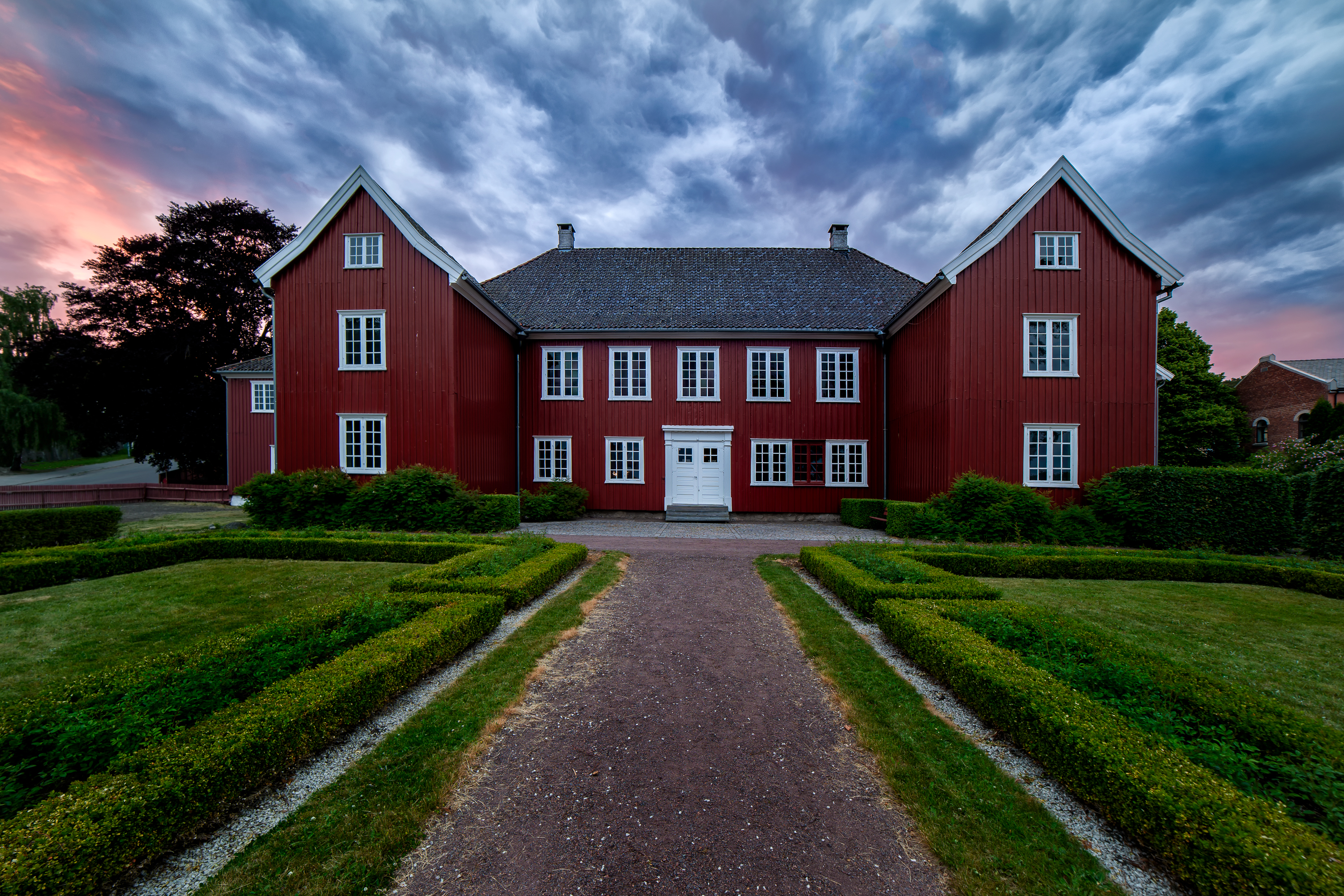 Herregården i Larvik ble bygd av Ulrik Fredrik Gyldenløve og stod ferdig i 1677. Hovedbygningen og portalen er fredet. Bygningen ble fredet så tidlig som i 1923, som en av de første etter at Bygningsfredningsloven trådte i kraft i 1920. I dag forvalter Larvik Museum bygningen. Foto: John Nilsen